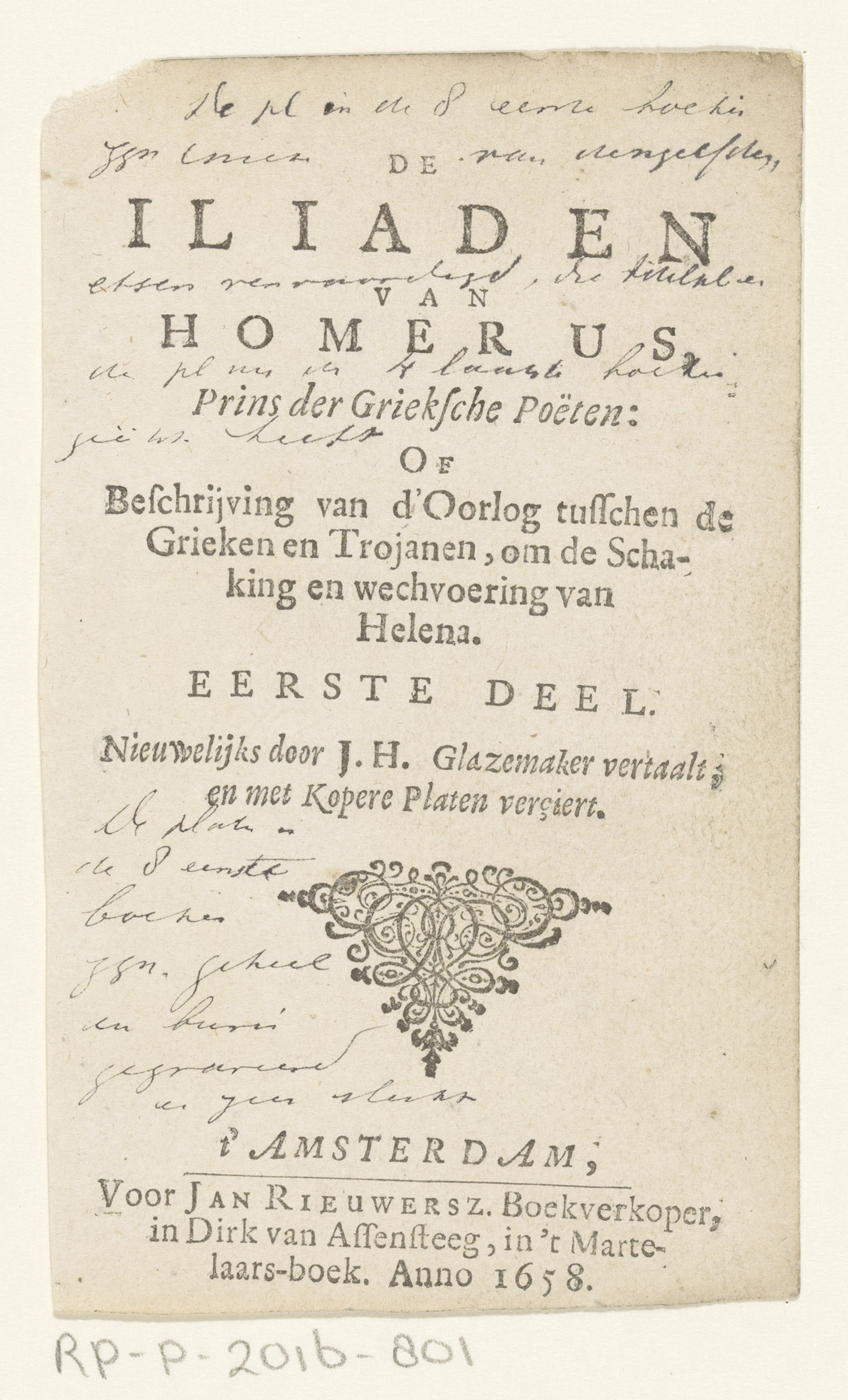 IdentificatieTitel(s): OrnamentTitelpagina voor: Homerus en Jan Hendrik Glazemaker, De iliaden van Homerus, eerste deel, 1658Objecttype: prent titelpagina Objectnummer: RP-P-2016-801Omschrijving: Ornament van vlechtwerk.VervaardigingVervaardiger: prentmaker: anoniemuitgever: Jan Rieuwertsz. (I) (vermeld op object)Plaats vervaardiging: AmsterdamDatering: 1658Materiaal: papier Techniek: houtgravure / boekdrukAfmetingen: blad: h 125 mm × b 75 mmToelichtingTitelpagina voor: Homerus en Glazemaker, Jan Hendrik. De iliaden van Homerus, eerste deel. Amsterdam: Rieuwertsz., Jan (I), 1658.OnderwerpWat: ornaments ~ artVerwerving en rechtenVerwerving: onbekend 2016Copyright: Publiek domein